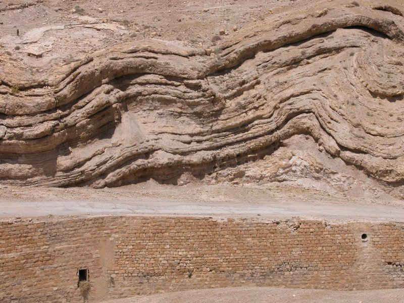 הדרך הבריטית שנסללה מירושלים ליריחו. ניתן לראות את אבני התמך האופיינים לשיטה הבריטית. Old Road From Jerusalem To Jericho